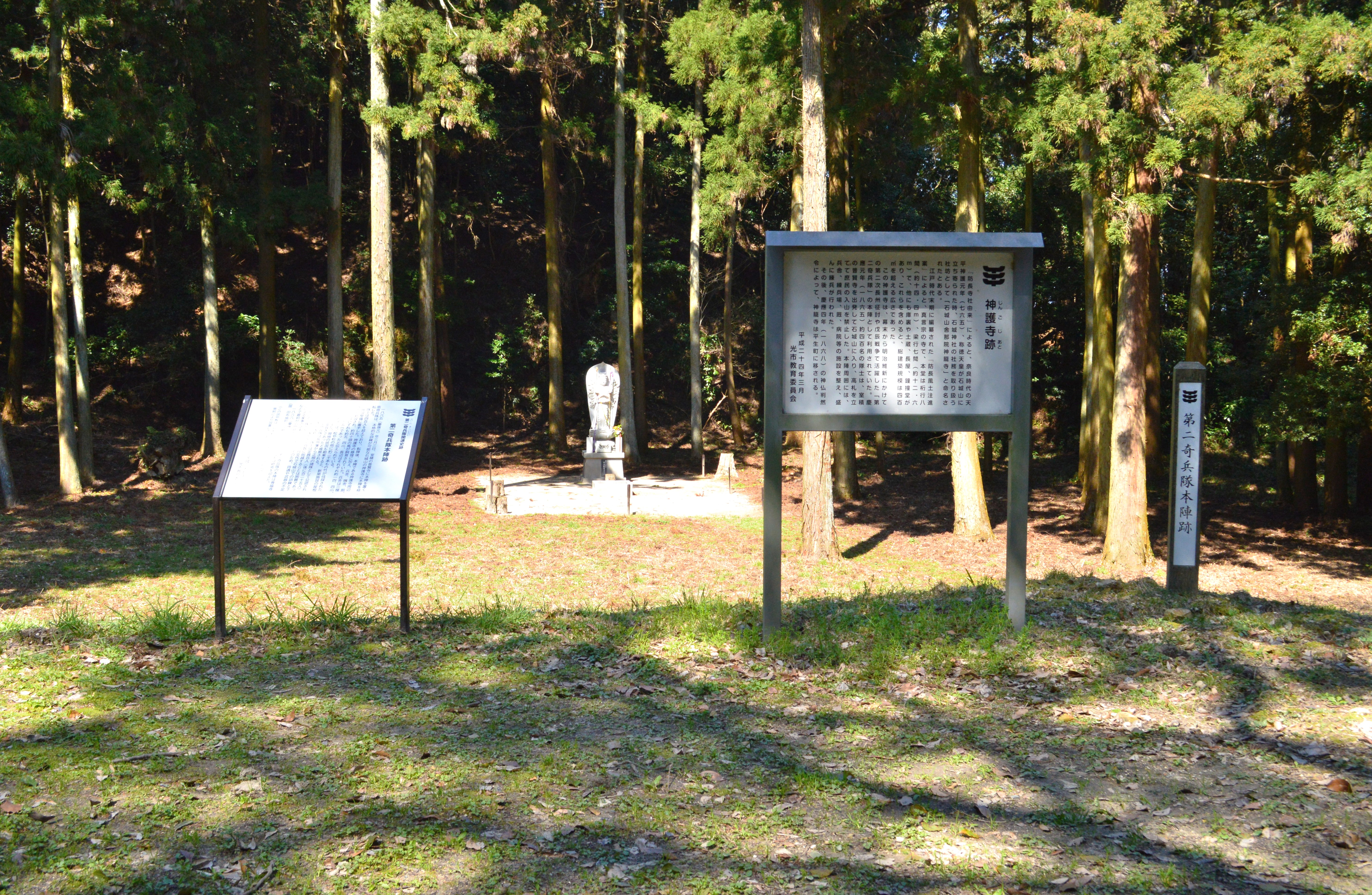 神護寺跡 (光市) 本堂